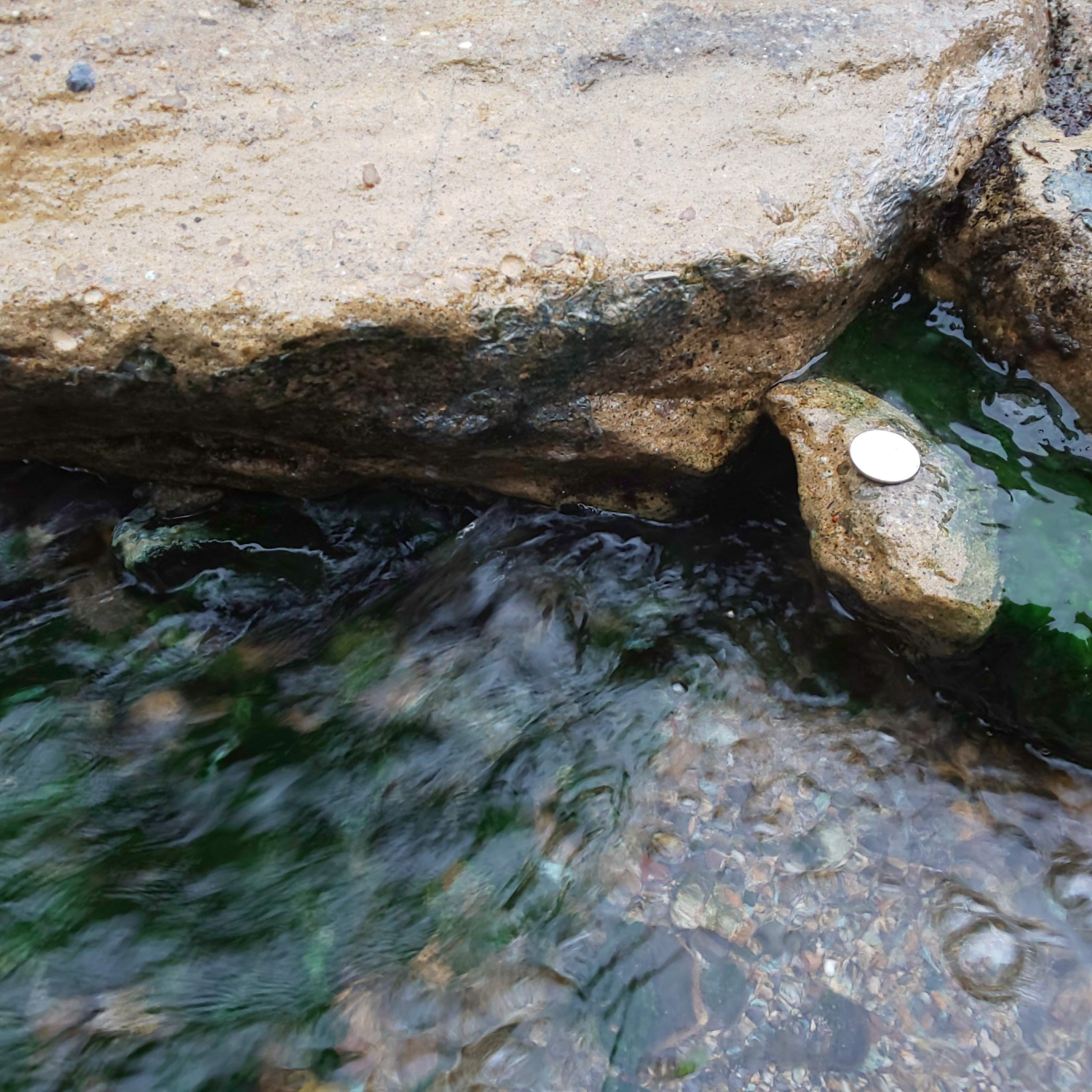 大川河川敷にある岩盤の隙間から湧き出す源泉。 白い円は比較用の100円玉。